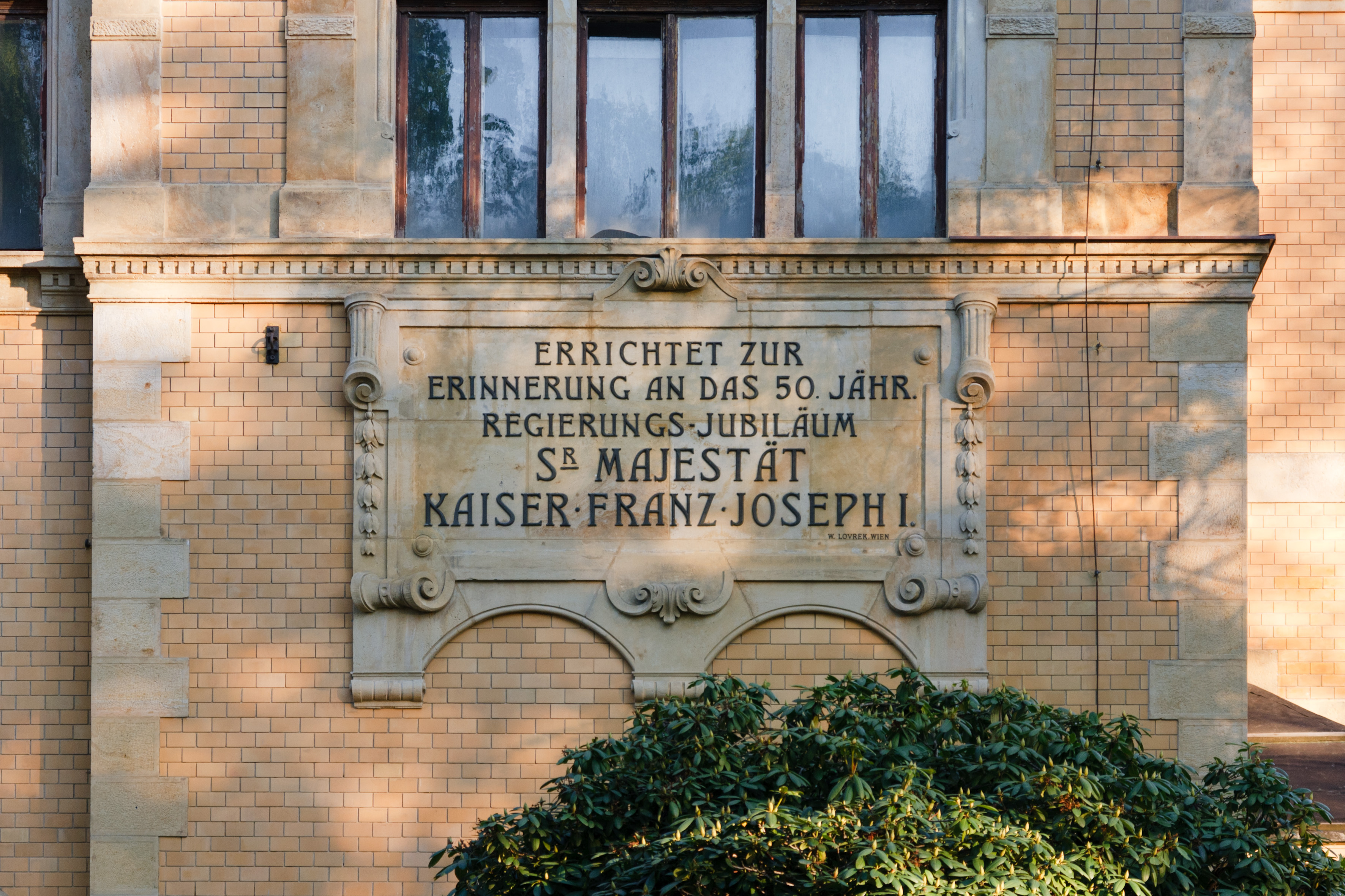 Městské lázně Liberec, pamětní deska